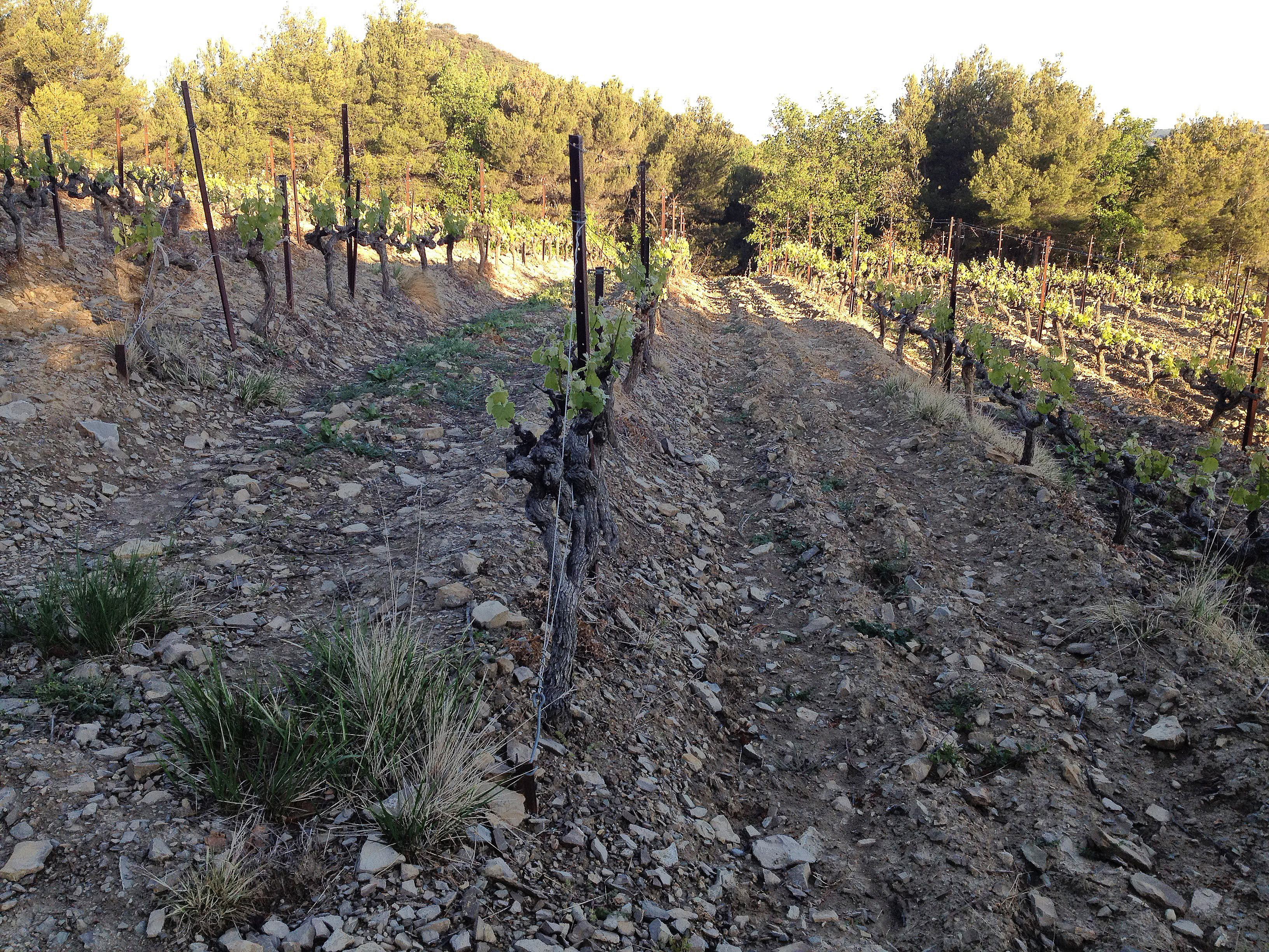 Jeunes vignes de l'AOC Séguret